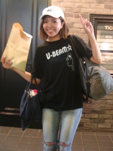 ゆーびーむ☆ (2018年9月8日)